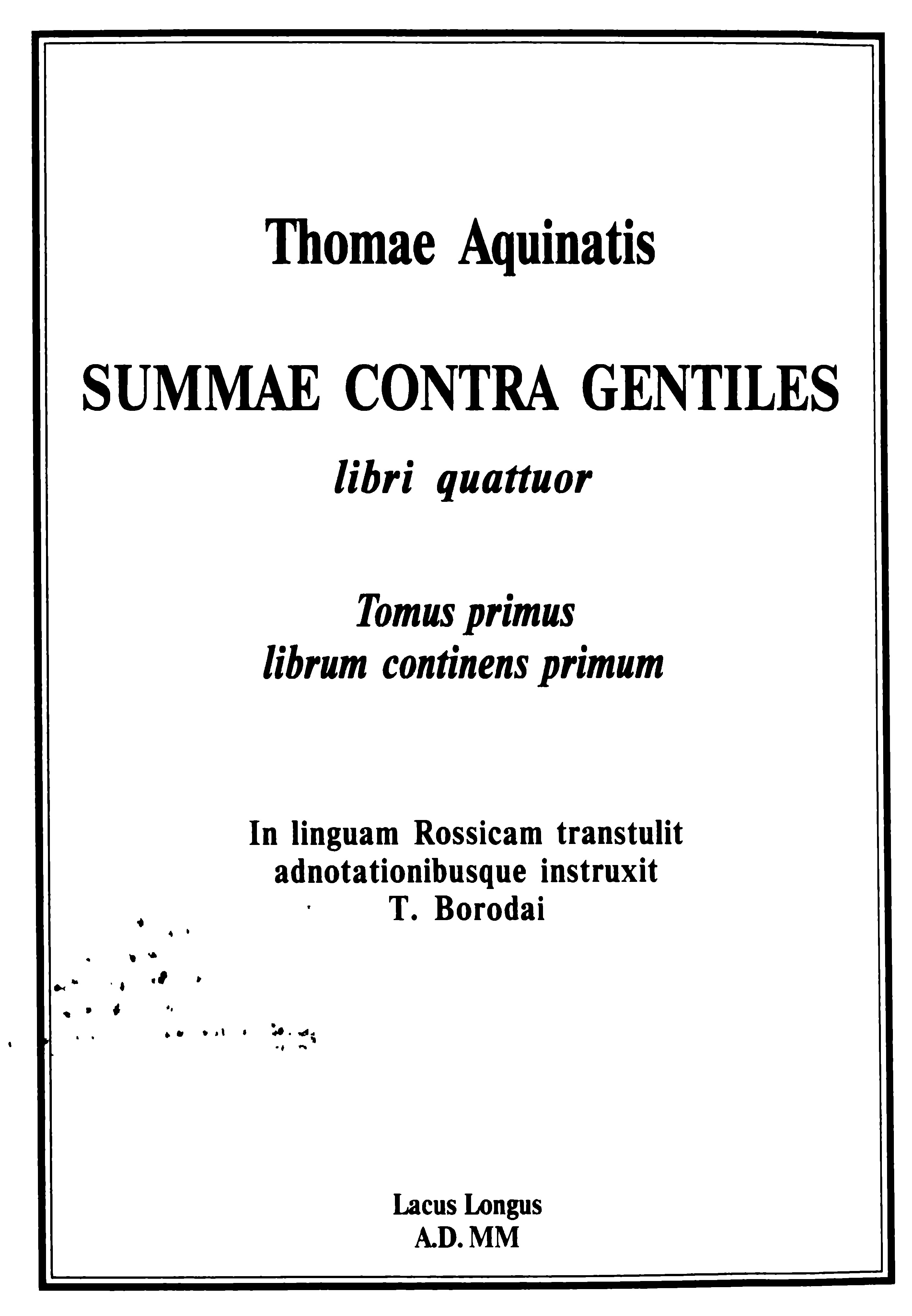 Titulus editionis Summae contra gentilies Thomae Aquinatis MM